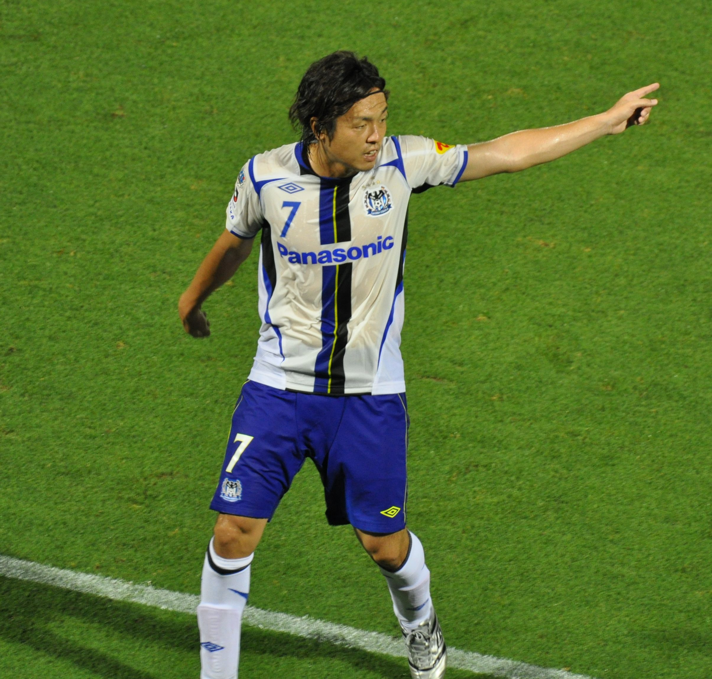 Yasuhito Endo from 2011.07.10 Omiya Ardija 2-3 Gamba Osaka_160